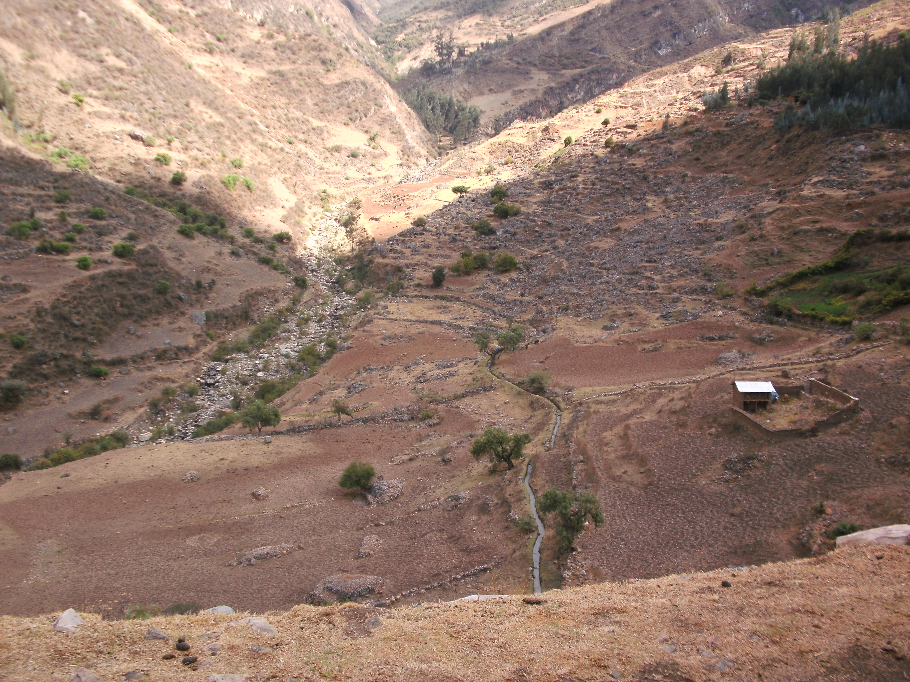 La quebrada de Pampachacra, paisaje agreste de la Sierra Oriental de Áncash, sus aguas avenan al río Yanamayo y éste al Marañón.